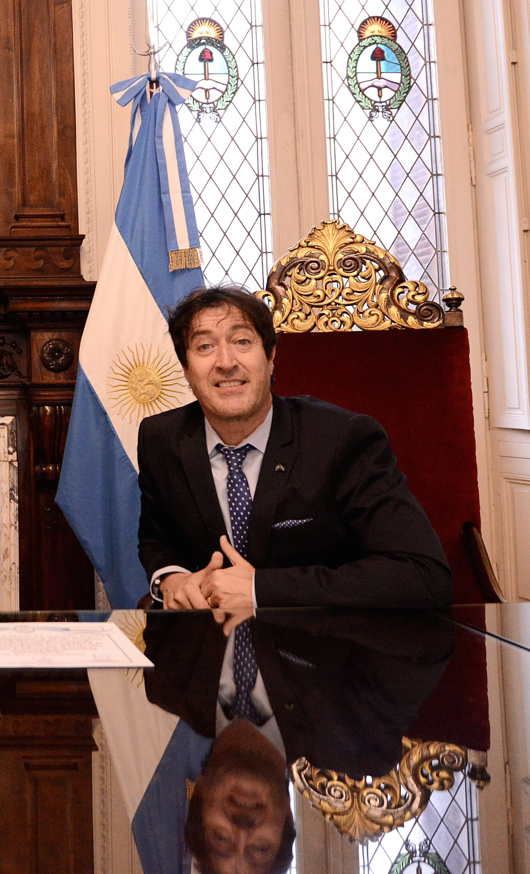 Pablo Aristizabal en el Salón de Honor del Congreso de la República Argentina, el 19 de noviembre 2015, día que recibió el diploma para Los Creadores como"programa de interés cultural y educativo" por la Honorable Cámara de Diputados de la Nación.